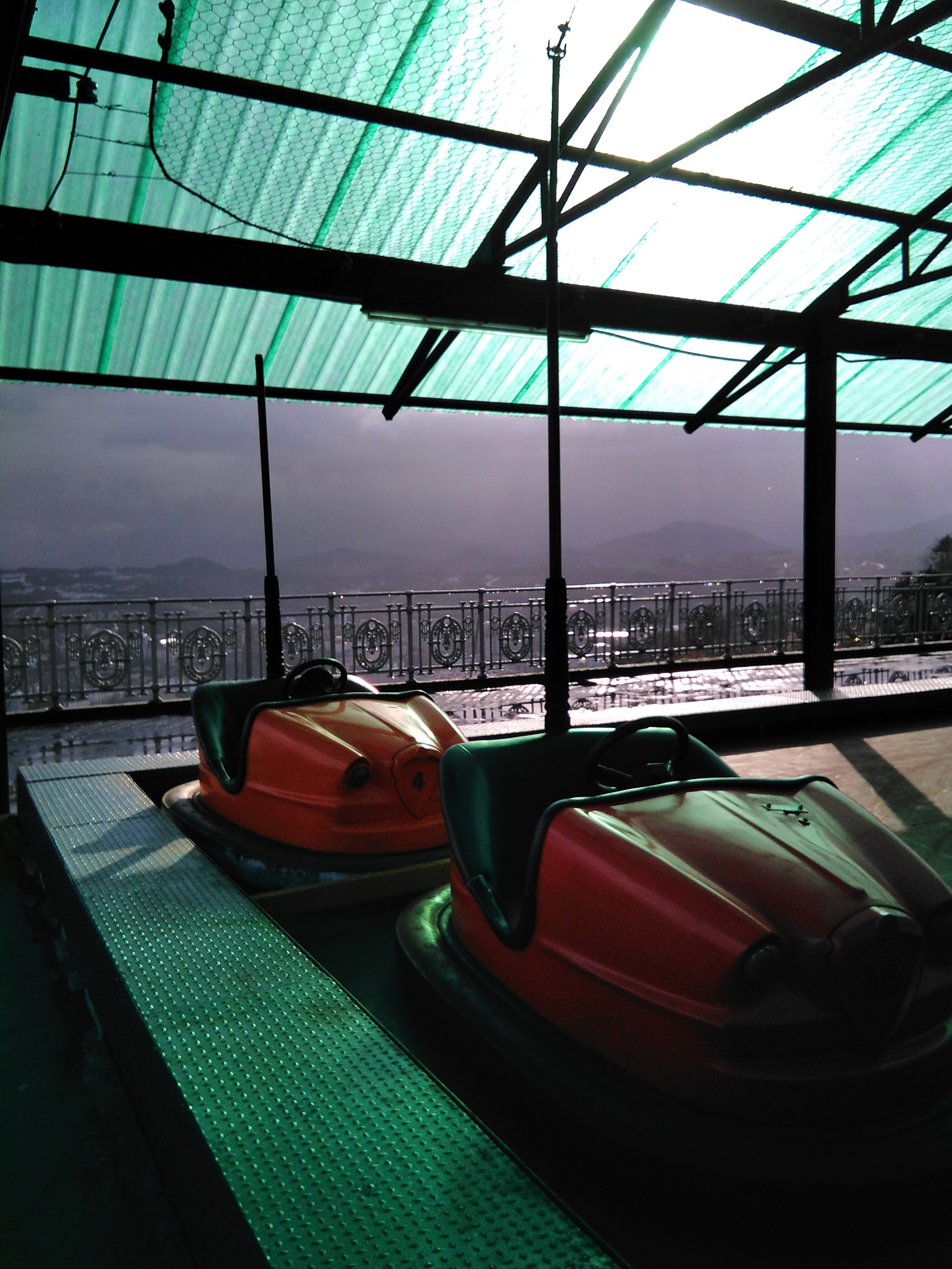 Dos coches de choque en el parque de atracciones del monte Igueldo, en diciembre de 2017.